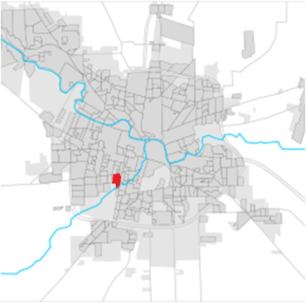 Ubicación del barrio en Córdoba (Argentina)